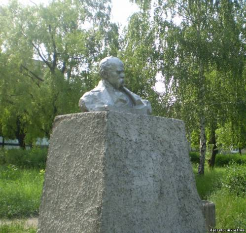 Бюст Тарасу Григоровичу Шевченку знаходиться коло Будинку Культури ім. Т.Г.Шевченка.